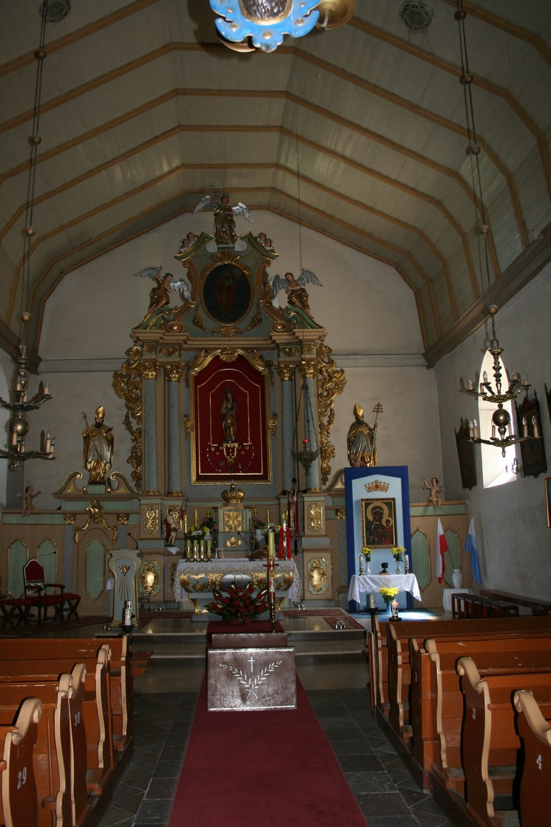 Papowo Biskupie - kościół